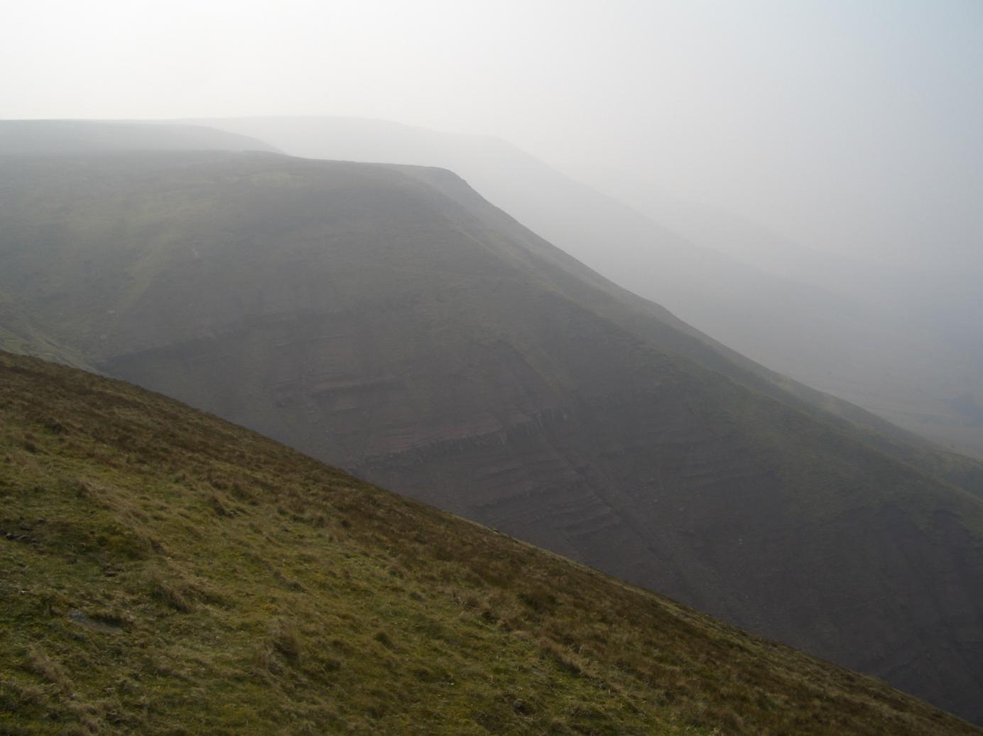 rhos dirion